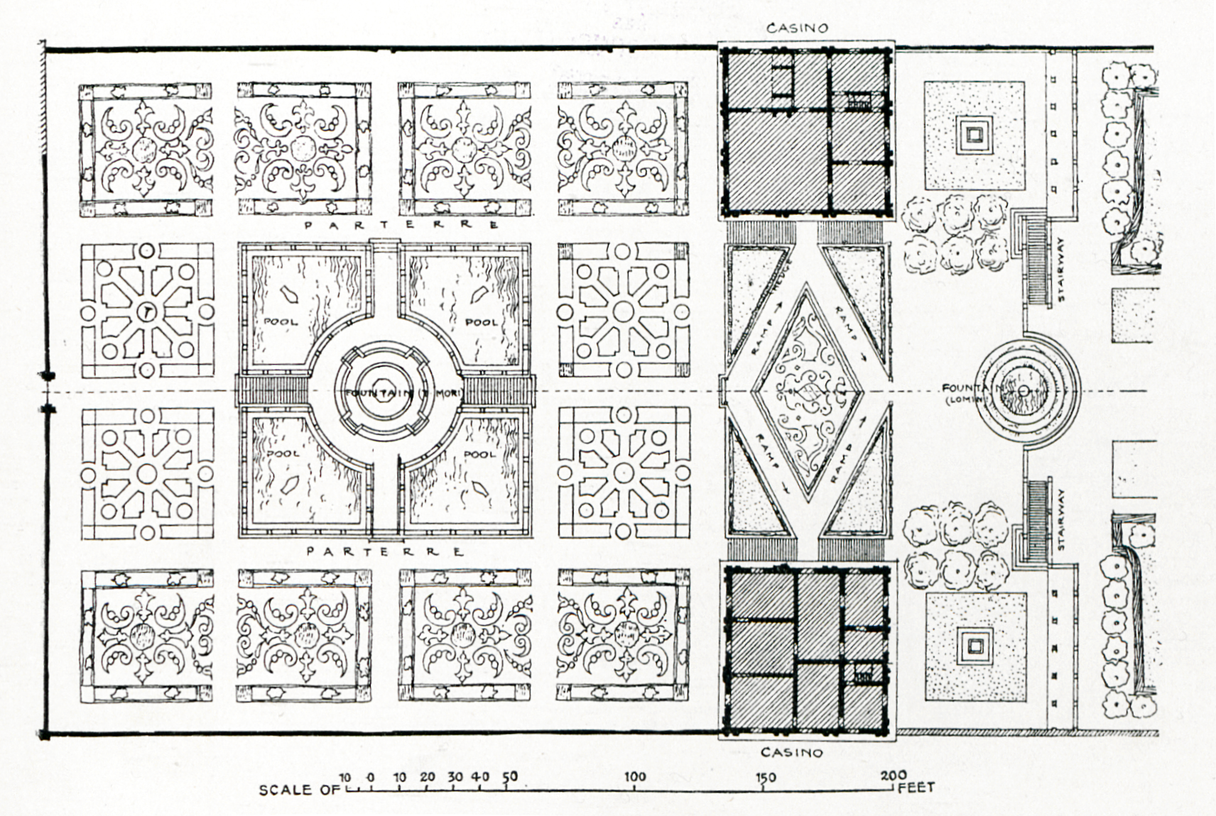 Garden craft in Europe. London 1913. Seite 47 unten. Plan der Villa Lante.